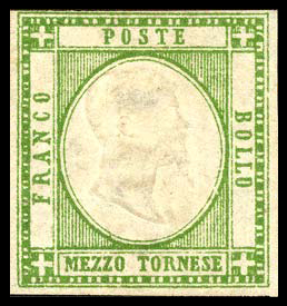 Марка Неаполитанской провинции. Считается некоторыми каталогами первой маркой Италии